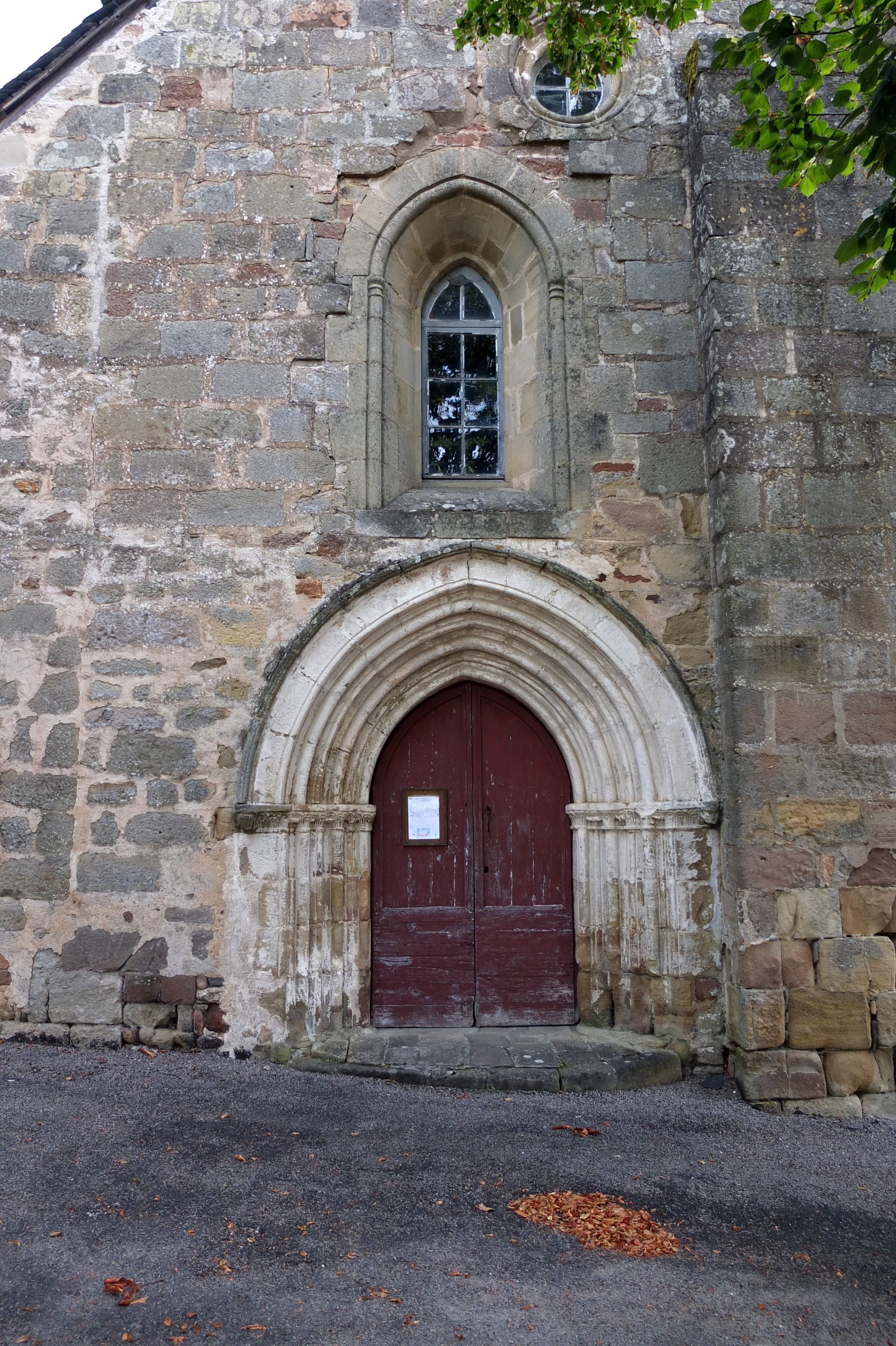 Église Notre-Dame d'Albignac, (ClasséInscrit, 19721972) This building is en partie classé, en partie inscrit au titre des Monuments Historiques. .